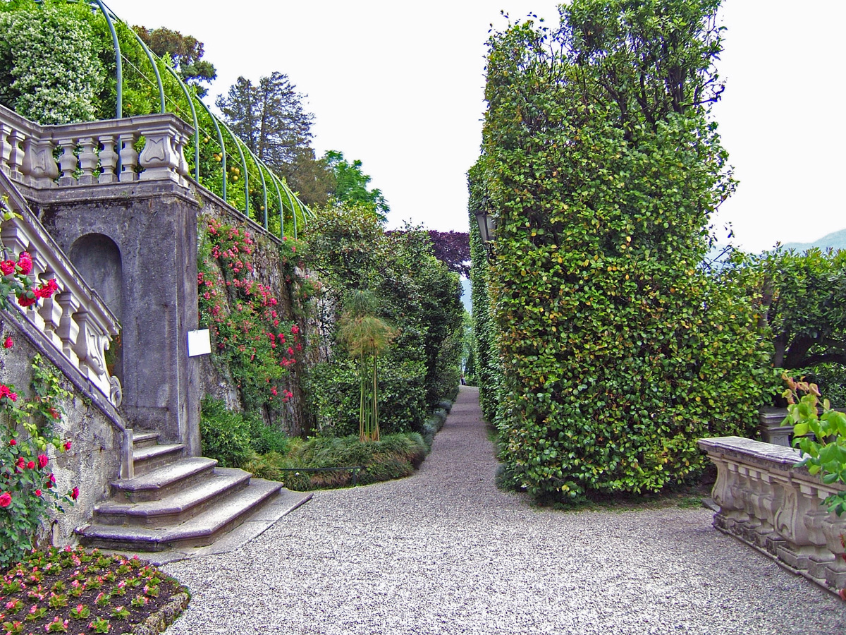 Villa Carlotta in Tremezzo, Lake Como